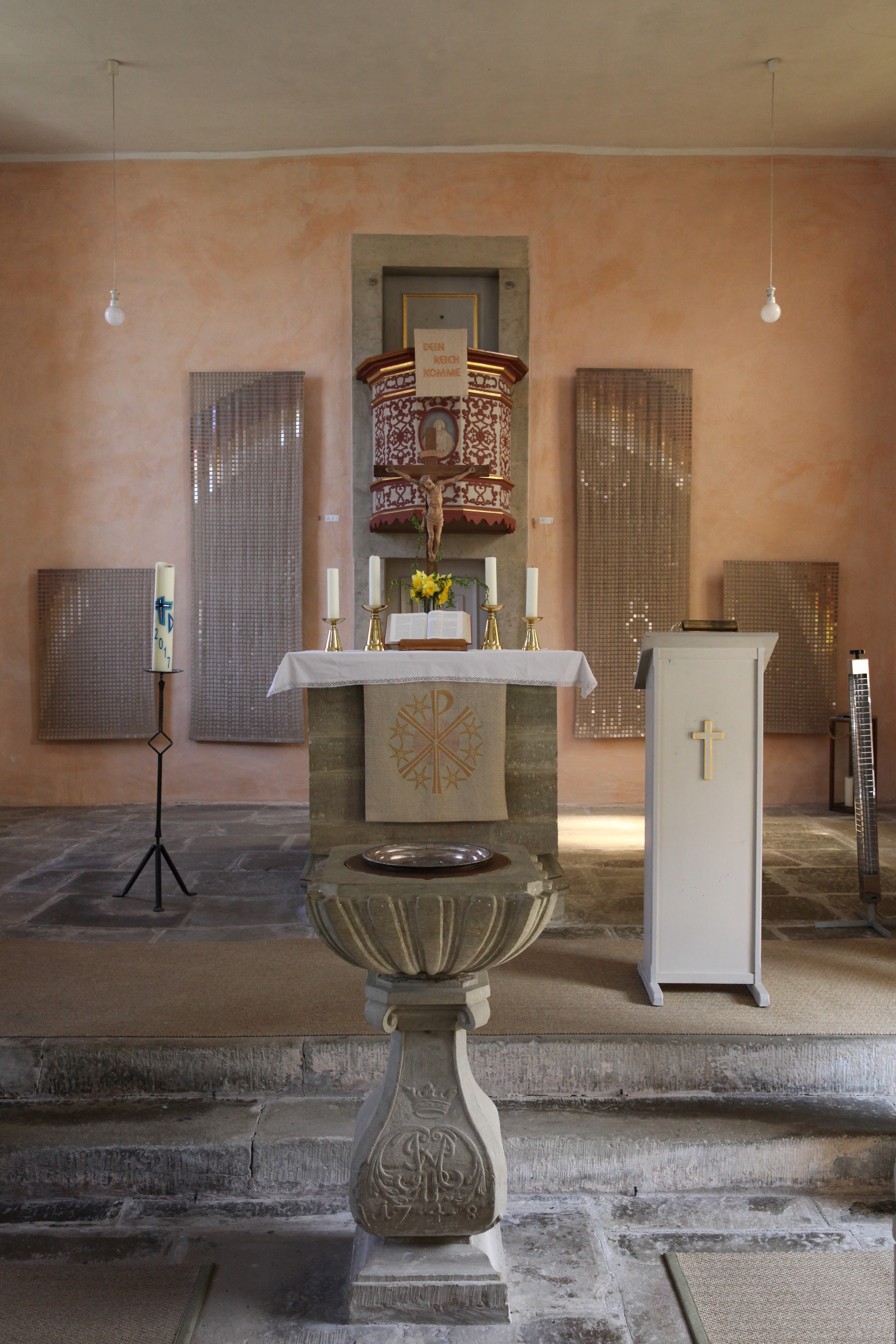 St. Paulus